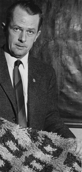 portrett, mann, skuespiller, stående helavfigur, knyttet teppe.